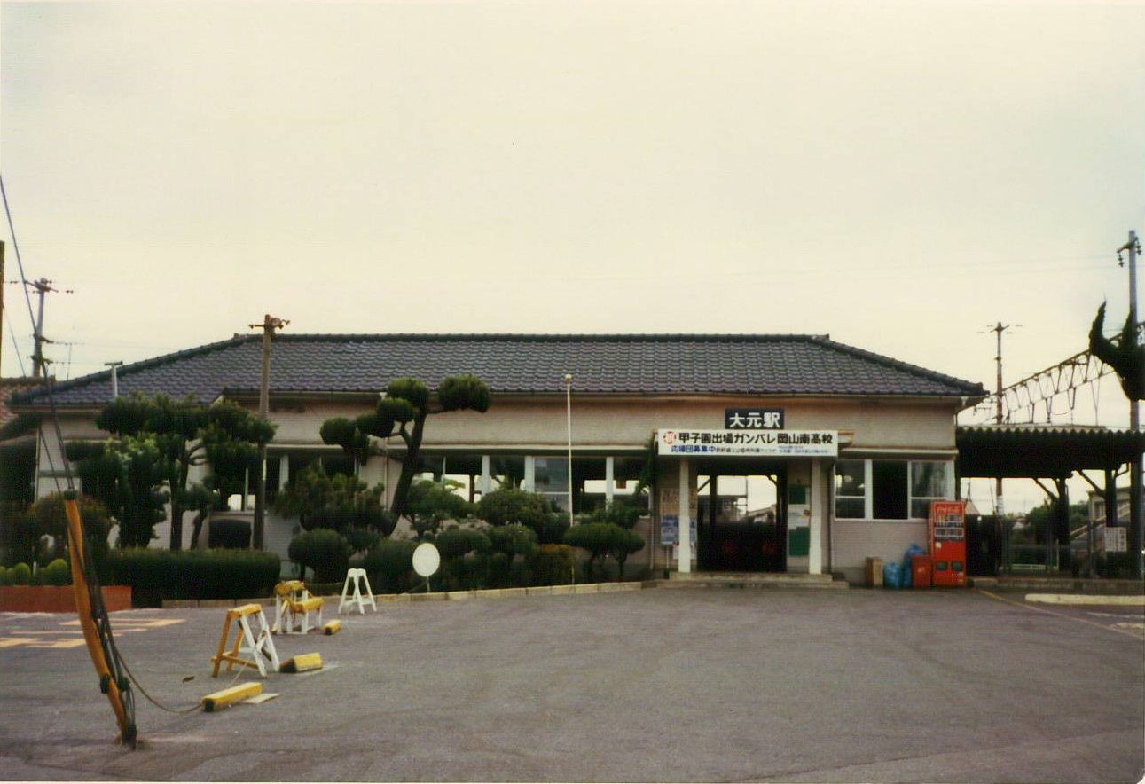 旧大元駅駅舎（岡山県岡山市）